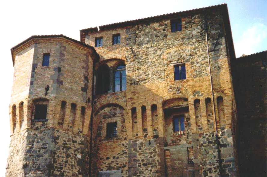 Château et musée de Sant'agata Feltria, Emilie-Romagne, Italie